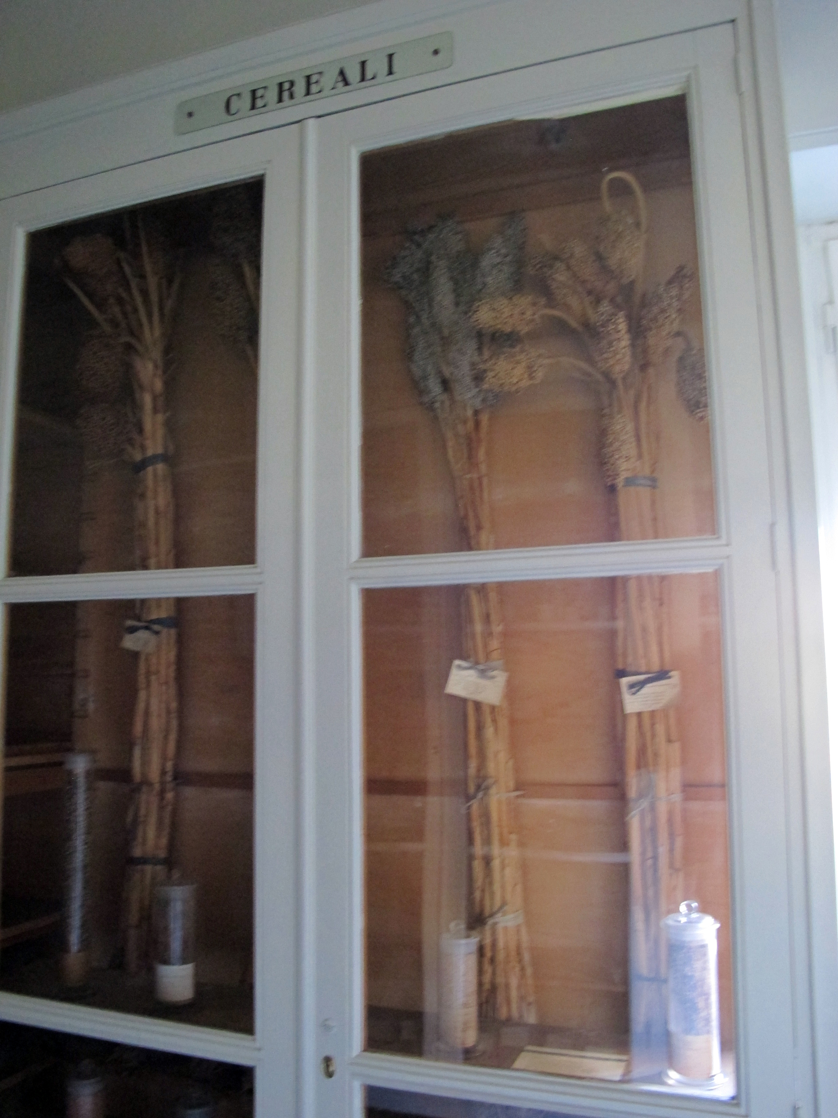 Istituto agronomico per l'oltremare, int., campionario